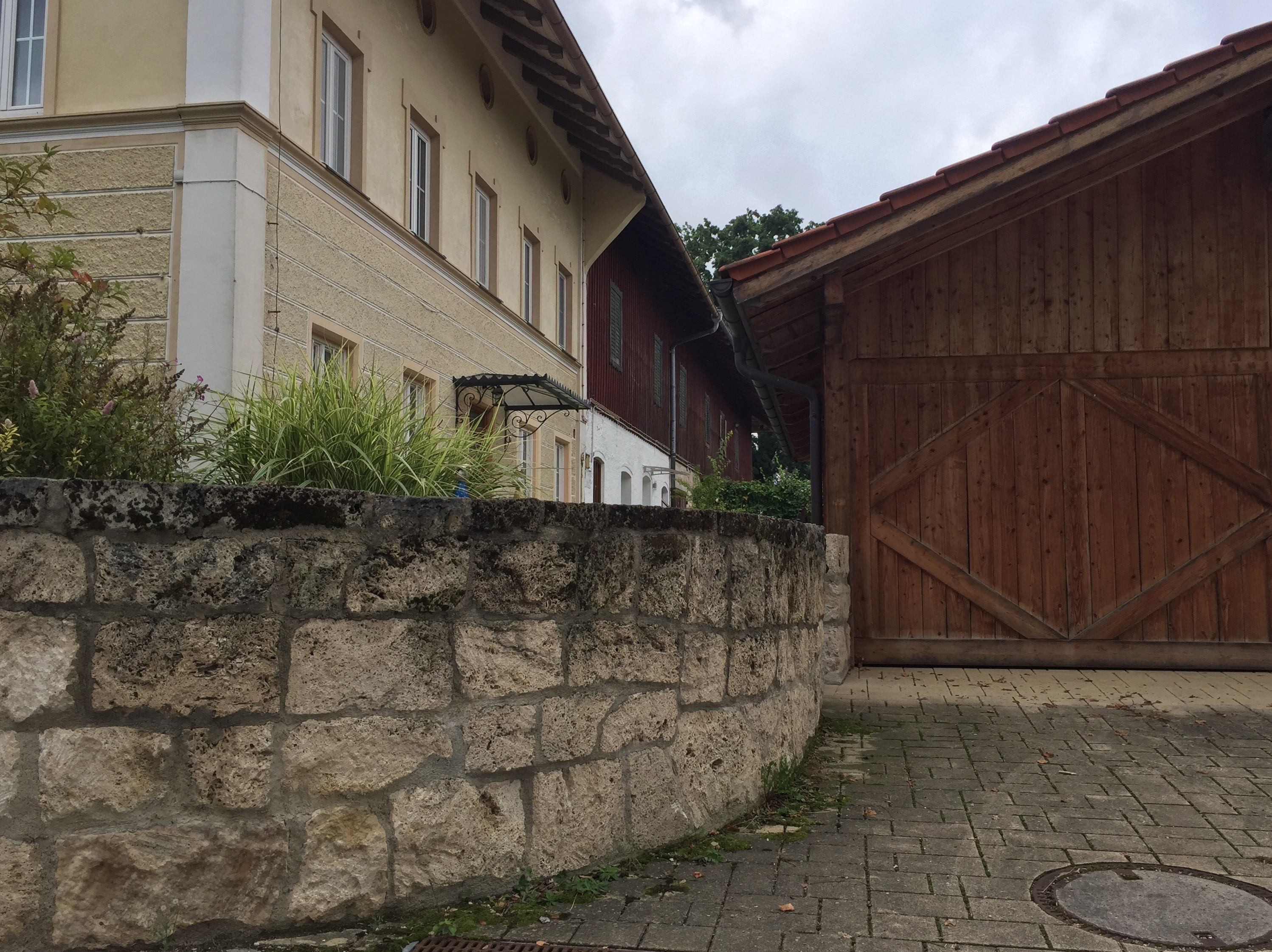 Hinter der Steinmauer befindet sich der älteste Brunnen von Sauerlach, der Aychsteter-Brunnen